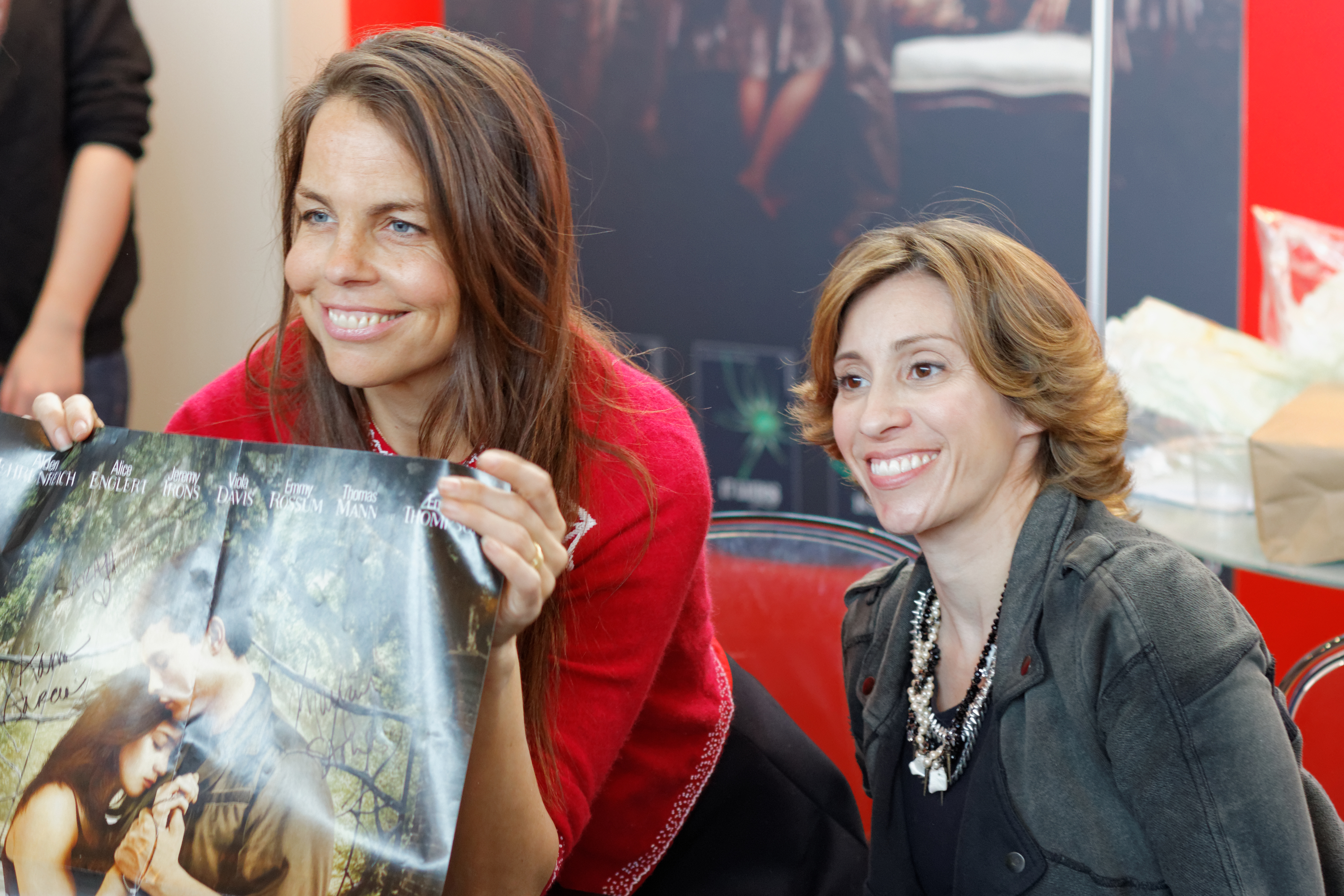 Kami Garcia, Margaret Stohl, salon du livre de Paris, 2013